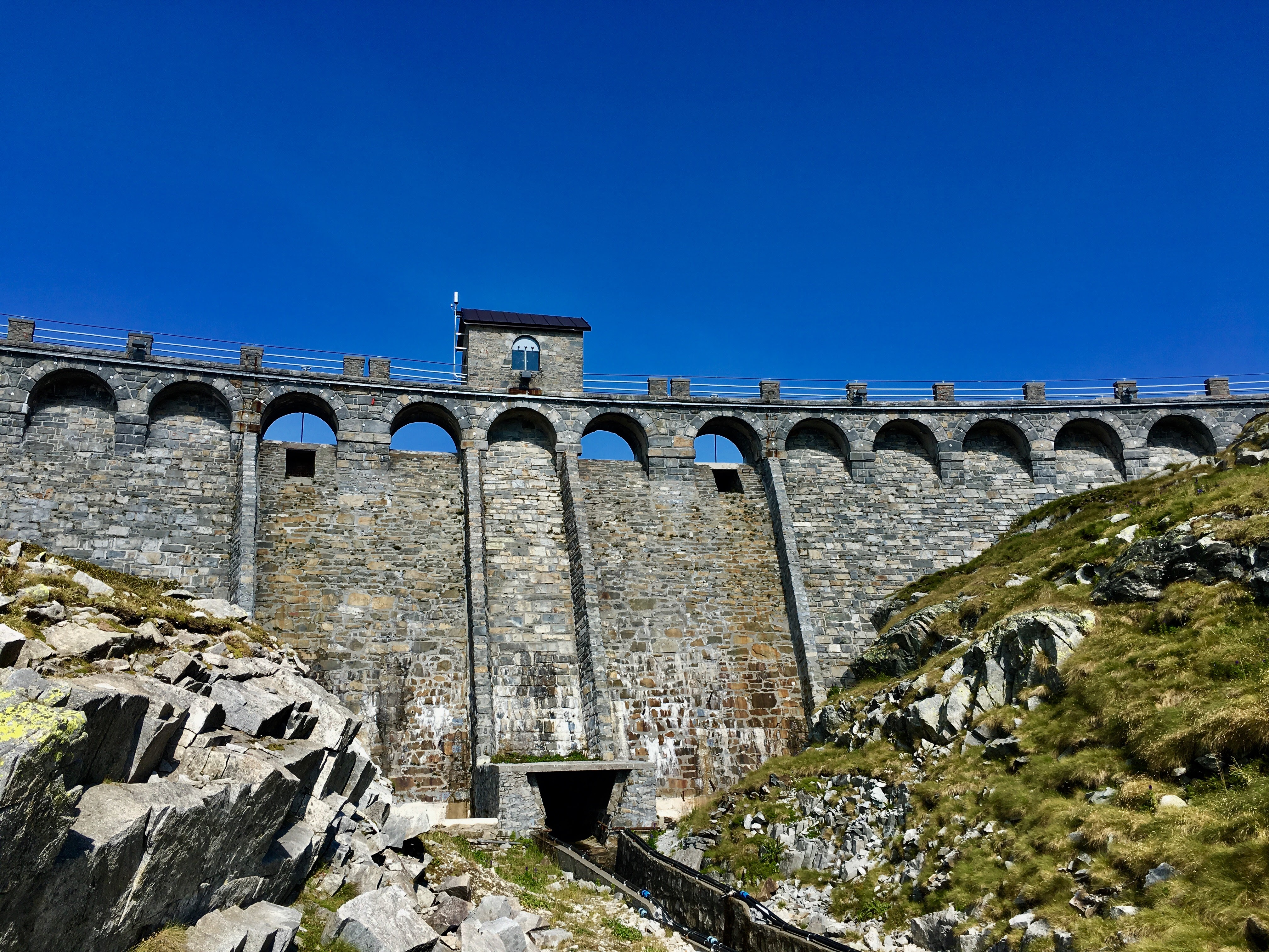 Parco Naturale Adamello (Q47780554)